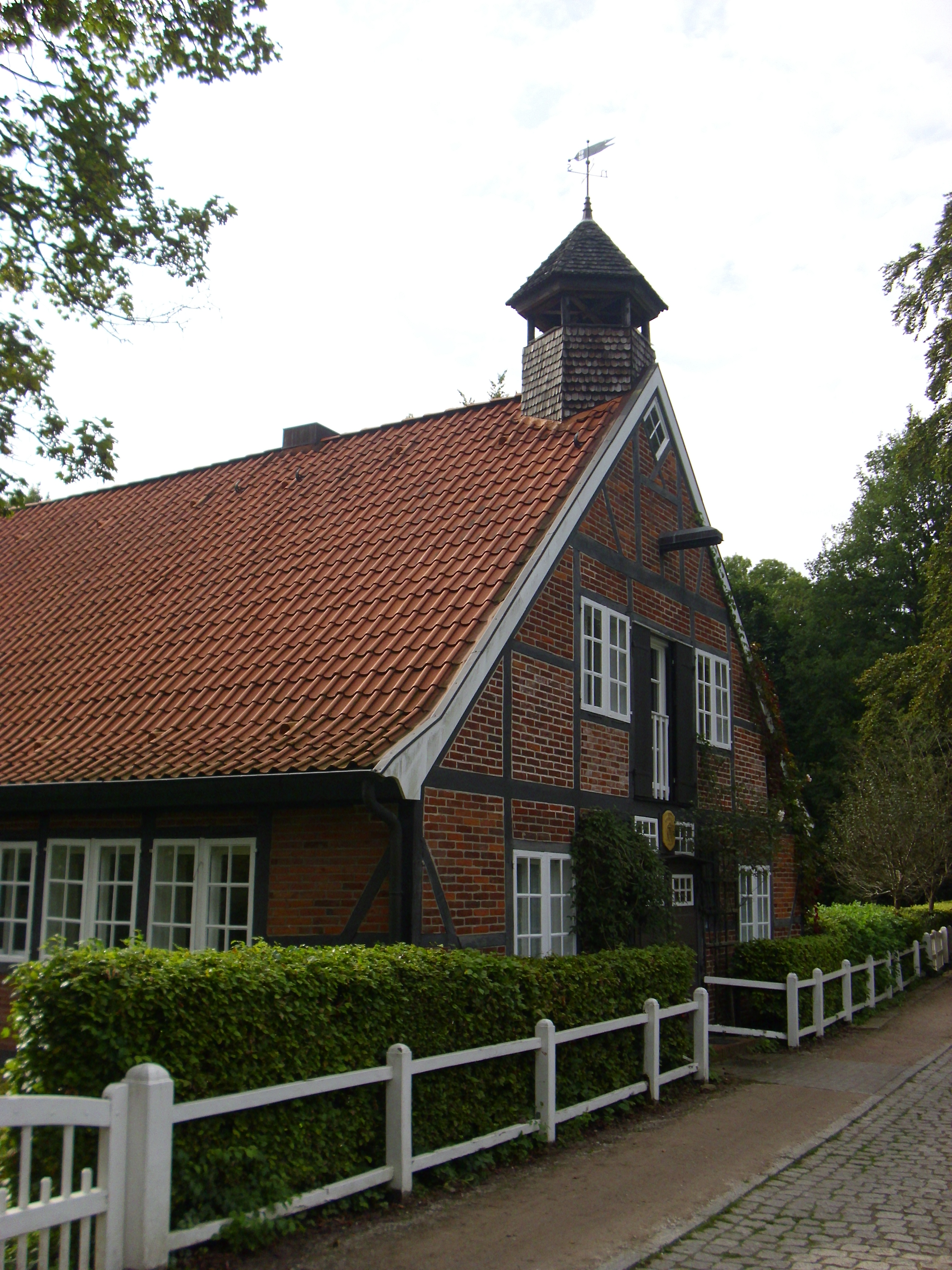 Kupfermühle, Herrenhausallee 64, 64a This is a photograph of an architectural monument.